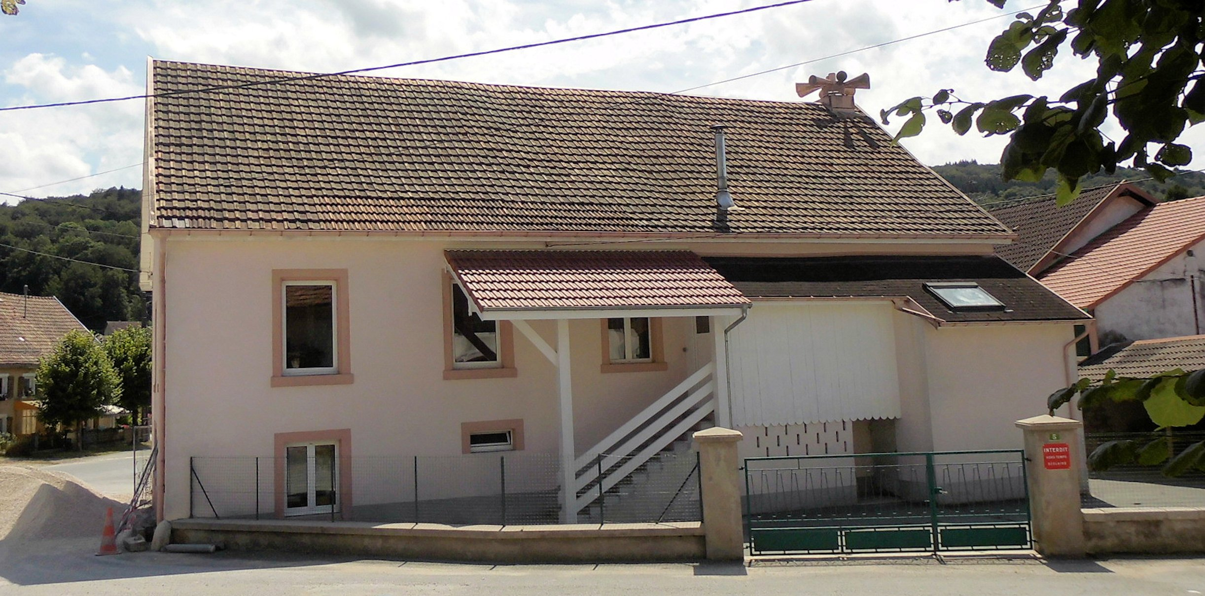 La mairie de Villars-lès-Blamont